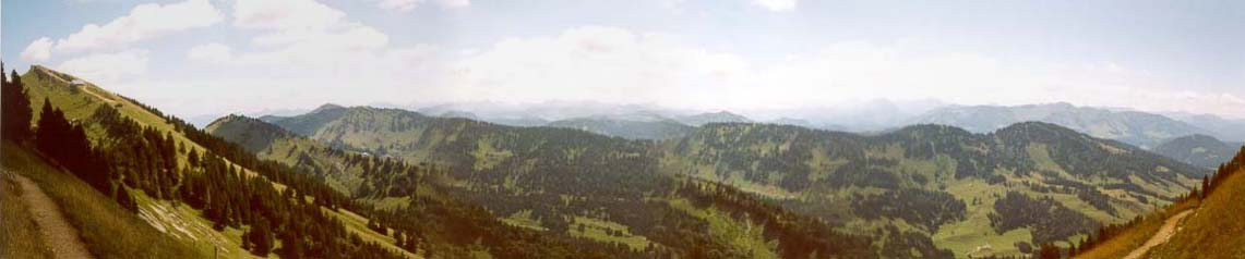 Panorama vom Hochgrat